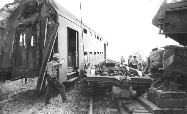 ADN-ZB Reiche-18.7.1976-Kr-Bez. Potsdam: Zugunglück vor dem Bahnhof Priort-In der Nacht zum 18.7.1976 kurz vor dem Bahnhof Priort fuhr ein Personenzug auf einen haltenden Güterzug auf. Dabei wurden 19 Personen verletzt, vier von ihnen, darunter der Triebfahrzeugführer des Personenzuges, erlitten schwere Verletzungen. (Näheres siehe ADN). Unser Foto zeigt Aufräumungsarbeiten an der Strecke.